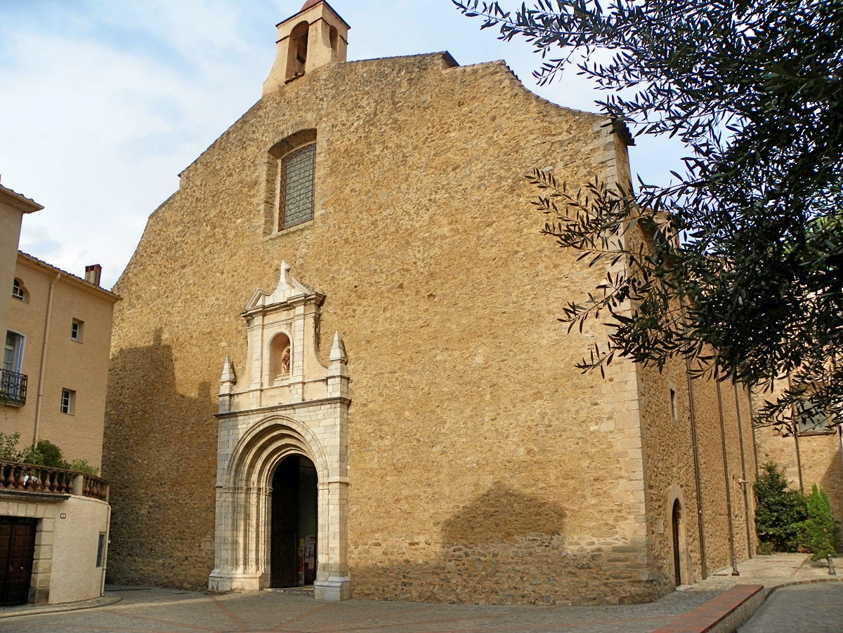 Església barroca de Sant Pere de Ceret (Vallespir) .